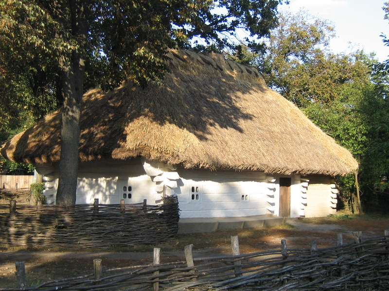 Садиба Якима Бойка